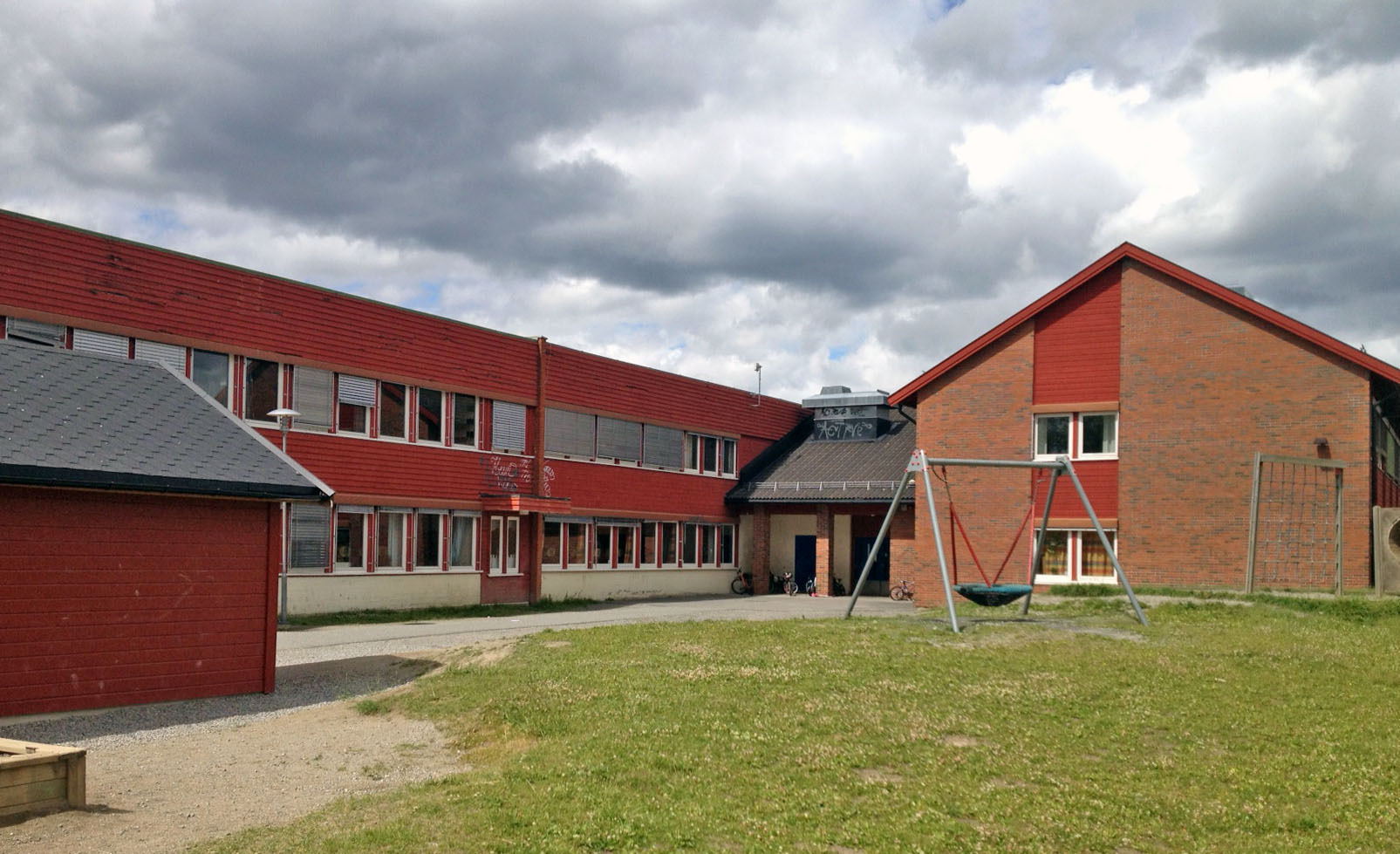 Ytre Enebakk skole, sør for Oslo